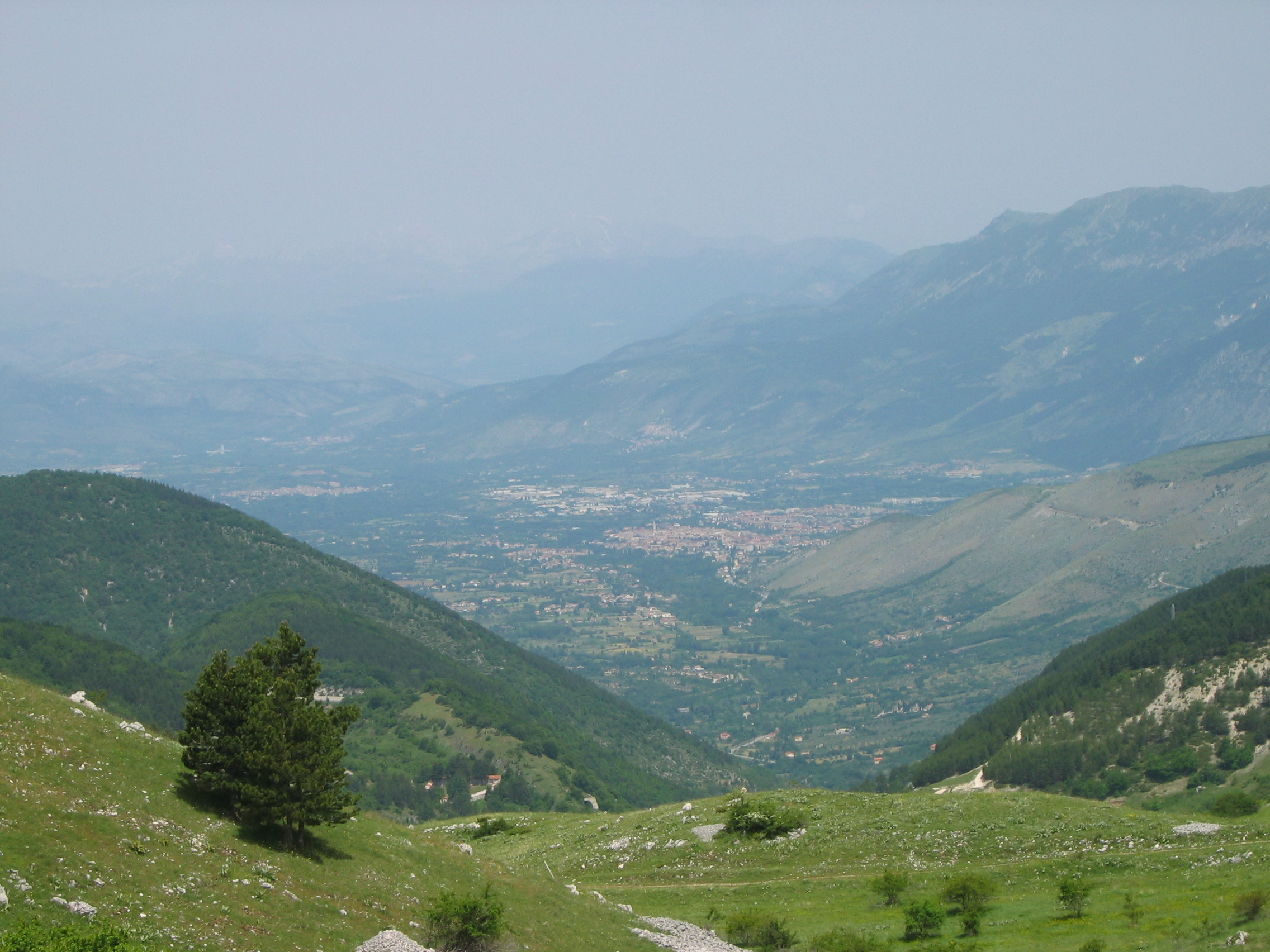 Vista Sulmona 01/06/08